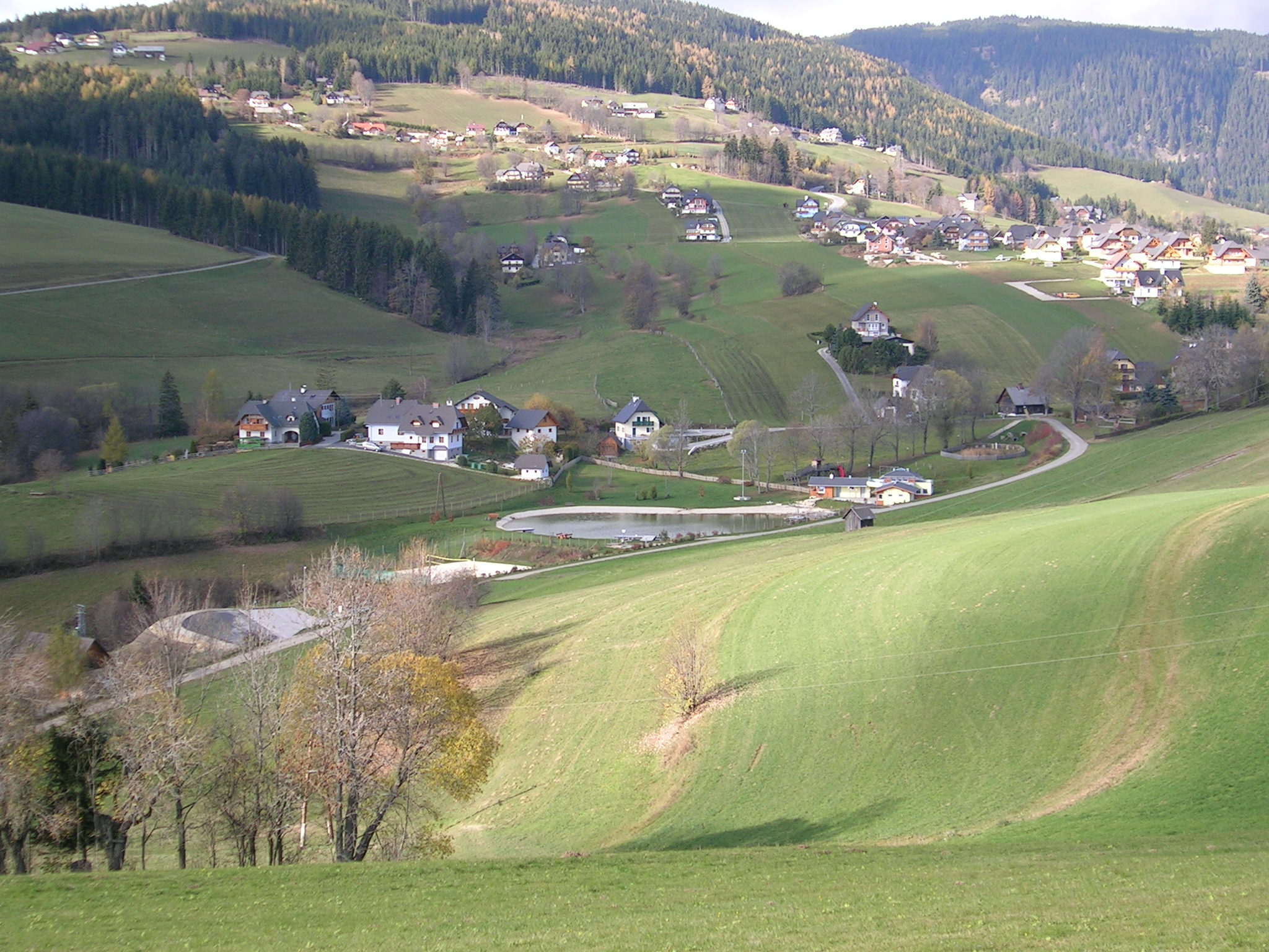 Blick auf das Fischbacher Freizeitland richtung Teufelstein